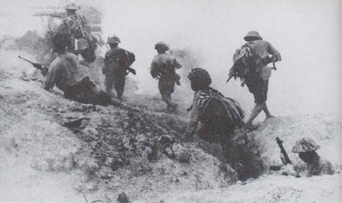 Bộ đội Việt Nam